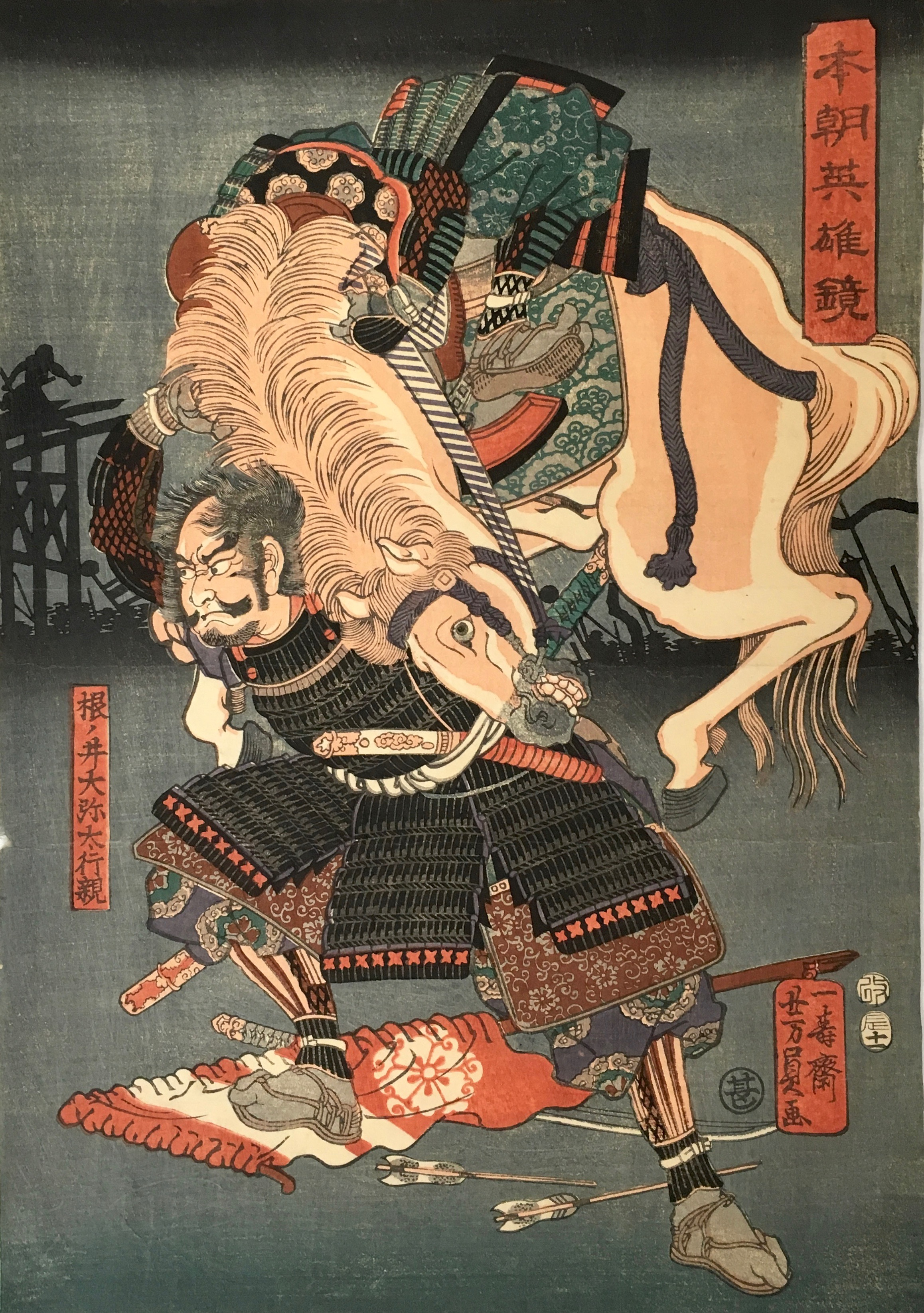 本朝英雄鏡 根井行親